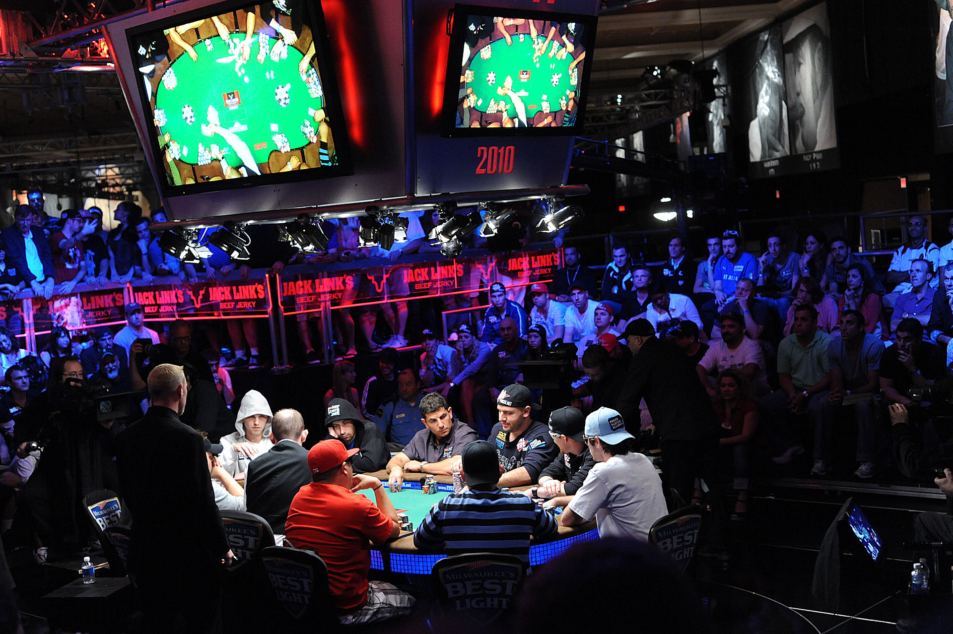 Il tavolo finale del Main Event delle WSOP 2010